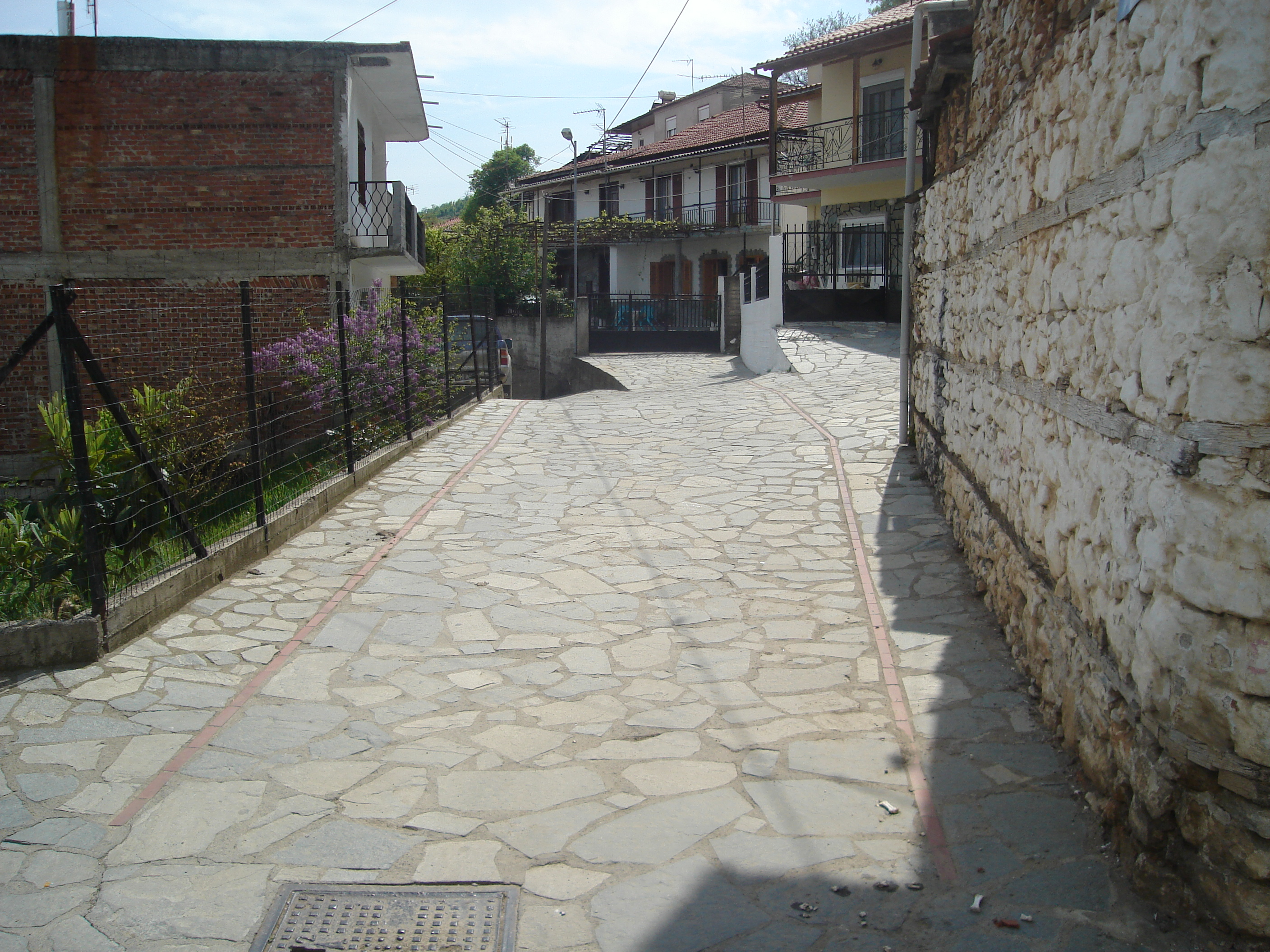 Παραδοσιακά Κτήρια στη Γρίβα